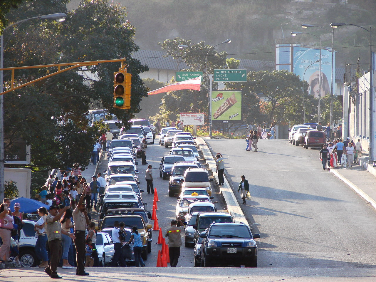 imágenes de Caracas - bajando hacia Santa Mónica / subiendo hacia Av. Nueva Granada o El Valle